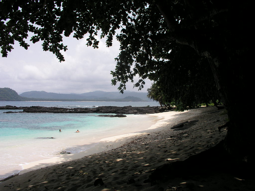 Onde fica o paraíso? seguramente na Praia Café, no ilhéu das Rolas, em S. Tomé.